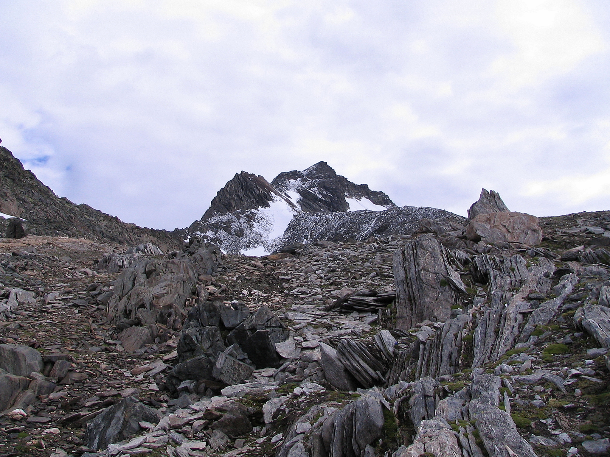 Kopuła szczytowa Weißspitze z podejścia od południowego zachodu